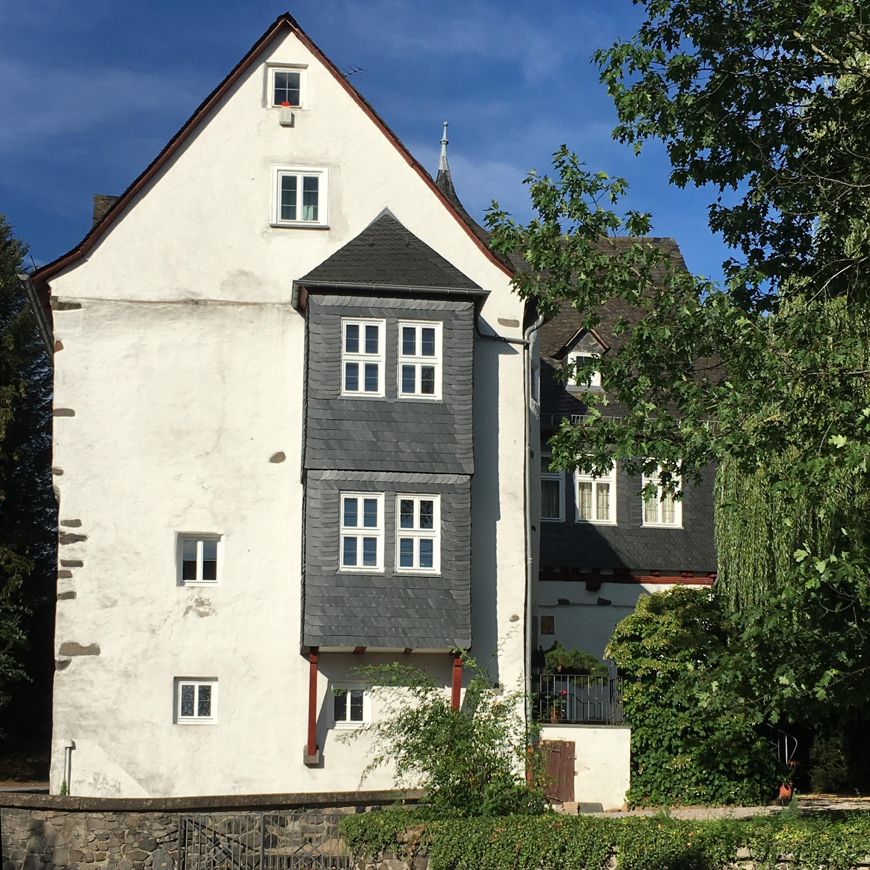 Hofhaus Langenderbach Südwestseite 2018.